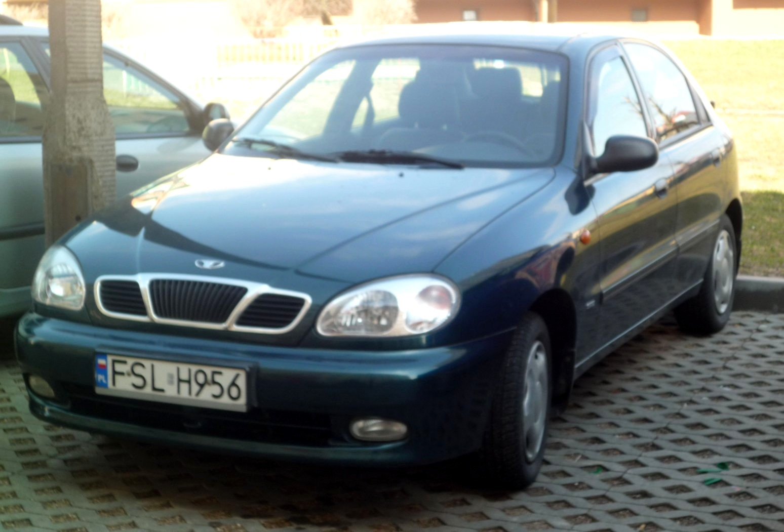 Daewoo Lanos w Słubicach.